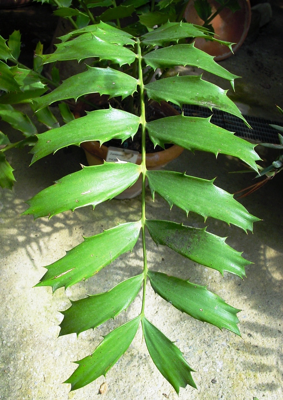 Encephalartos ferox (Giardino dei Semplici, Florence, Italy)